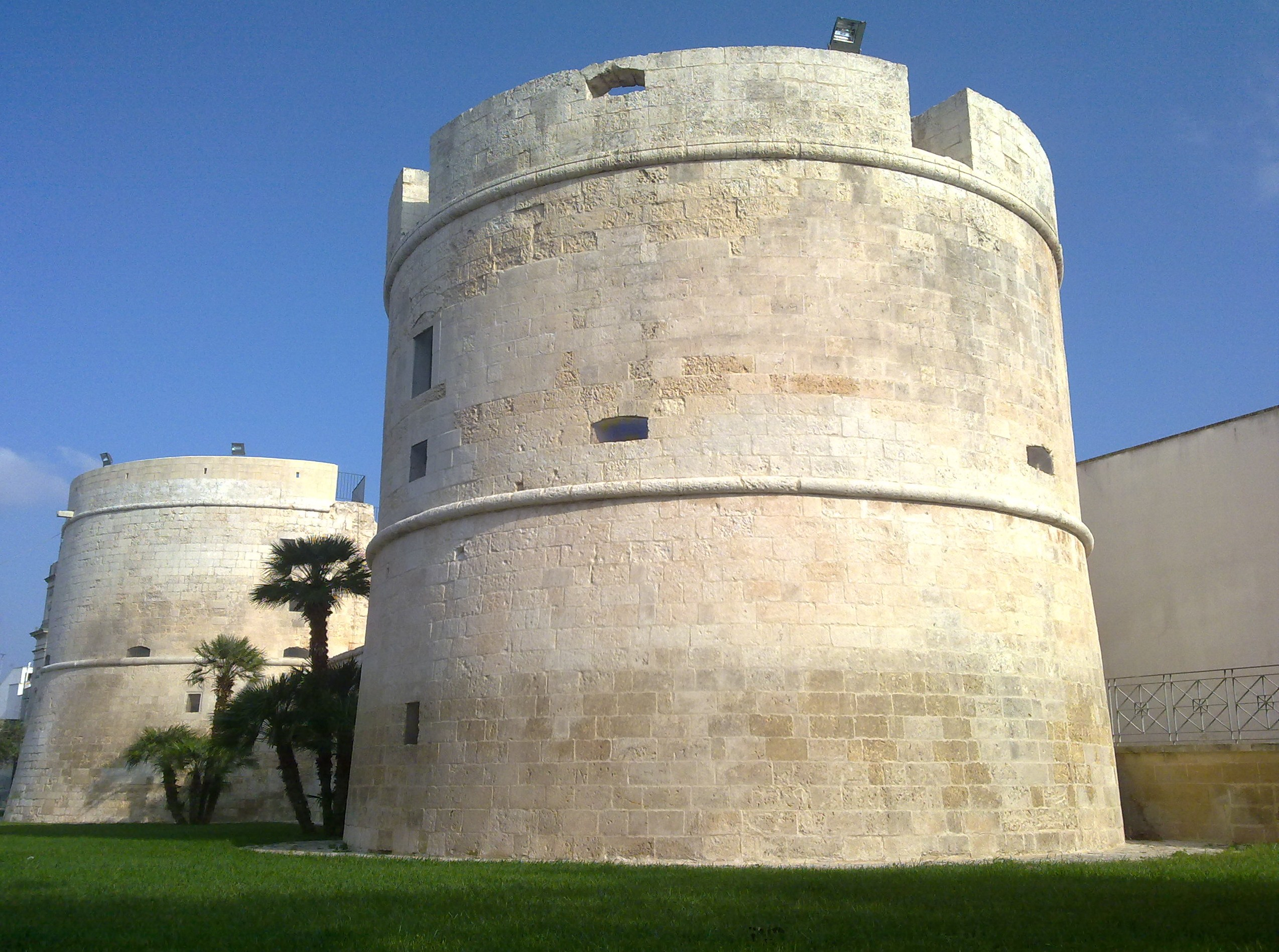 Castello aragonese di Palmariggi, Lecce